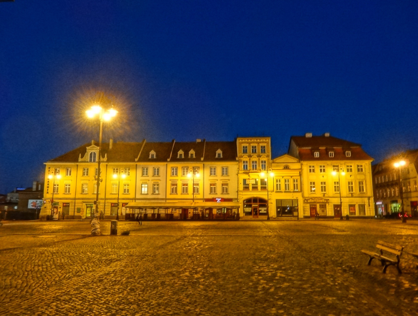 Stary Rynek w Bydgoszczy